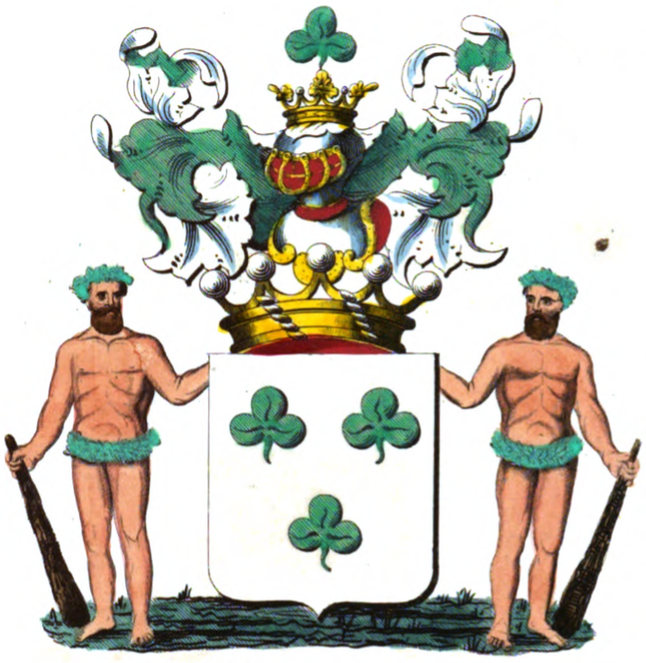 Armoiries de la famille van Praet